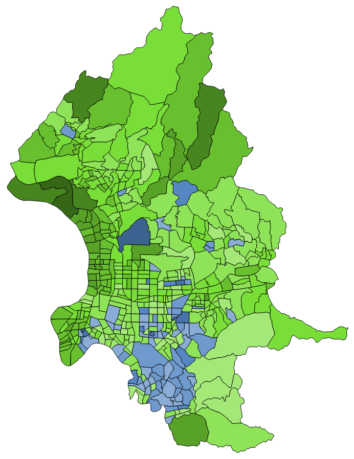 顏色對照表